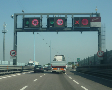 A57-TANGENZIALE MESTRE